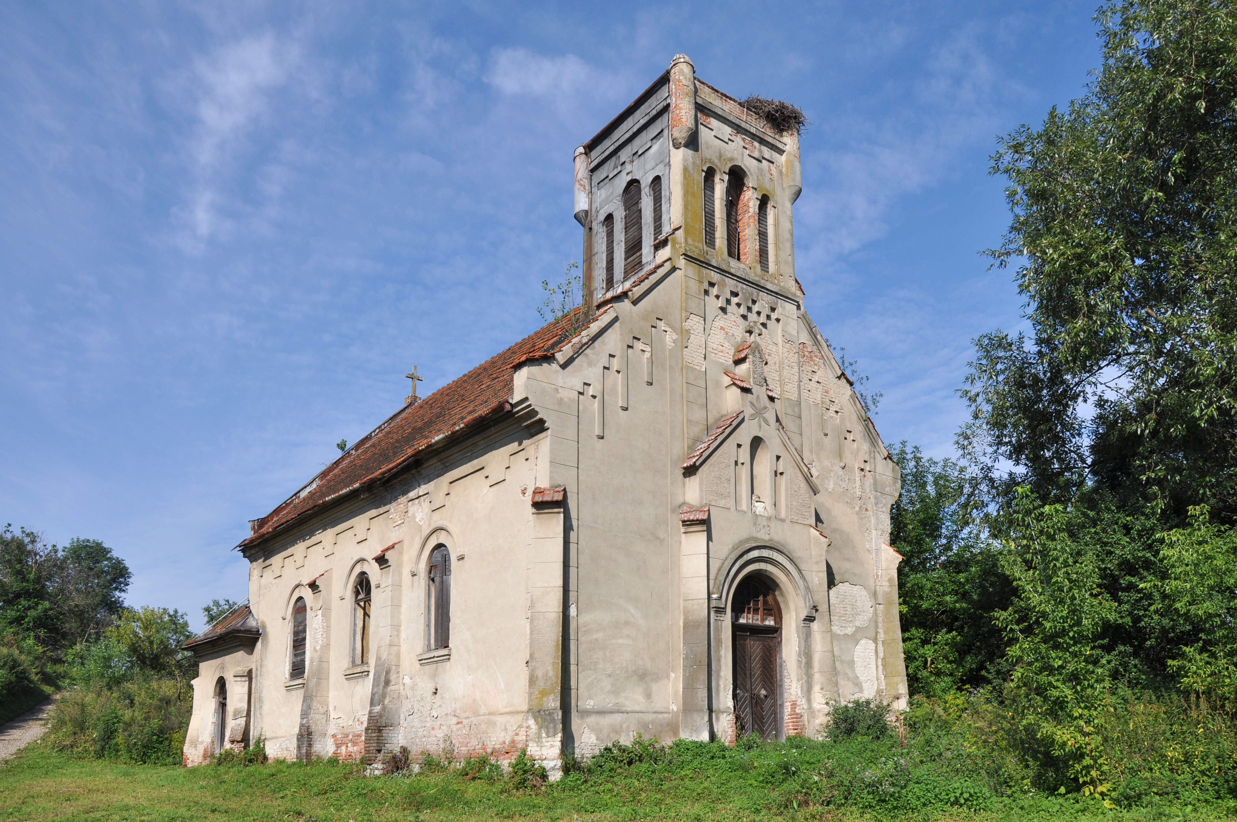 Костел (мур.), с. Медуха